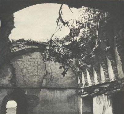 טירת ייאסו הראשון